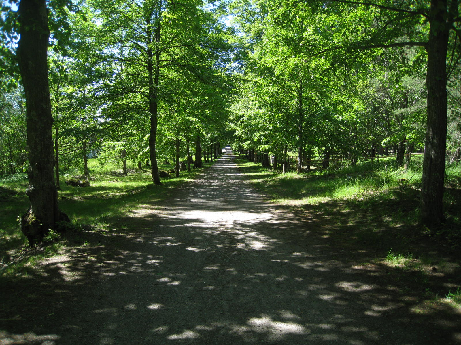 Görvälnsvägen, norra allén mot Görvälns slott, Görvälns naturrreservat, Järfälla kommun, Stockholms län.